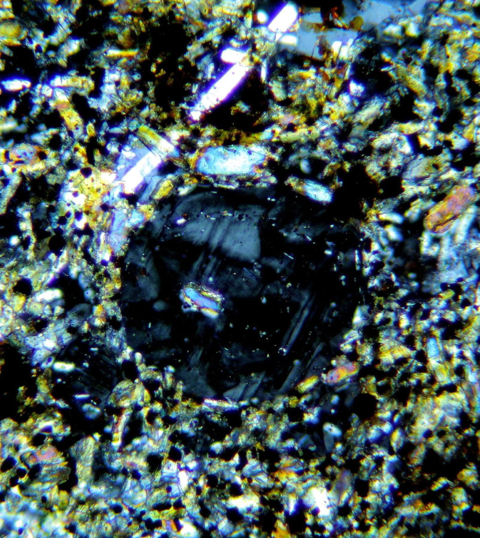 Leucit im Dünnschliff (XPL) mit Zwillingslamellen